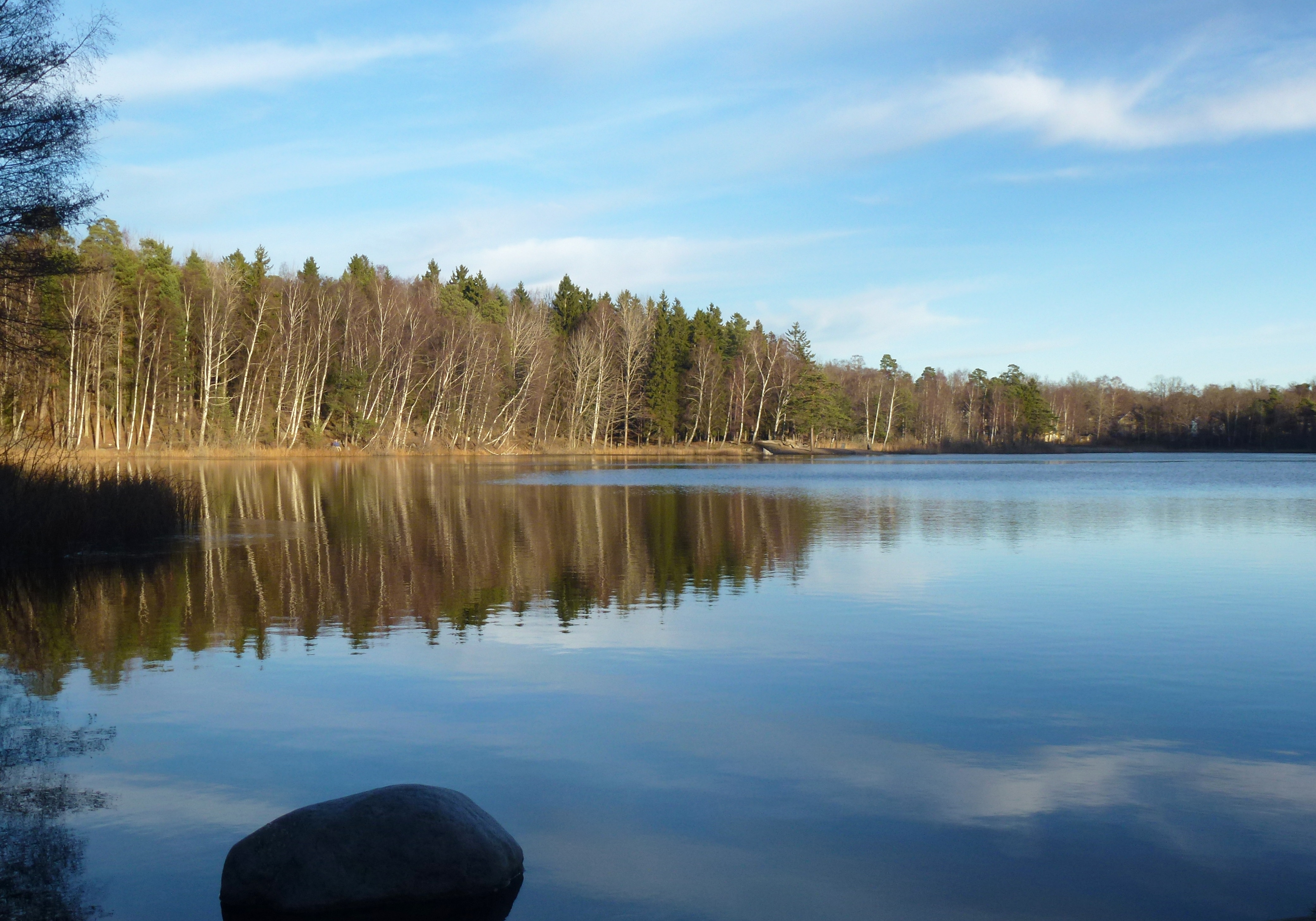 Långsjöns naturreservat, Nacka